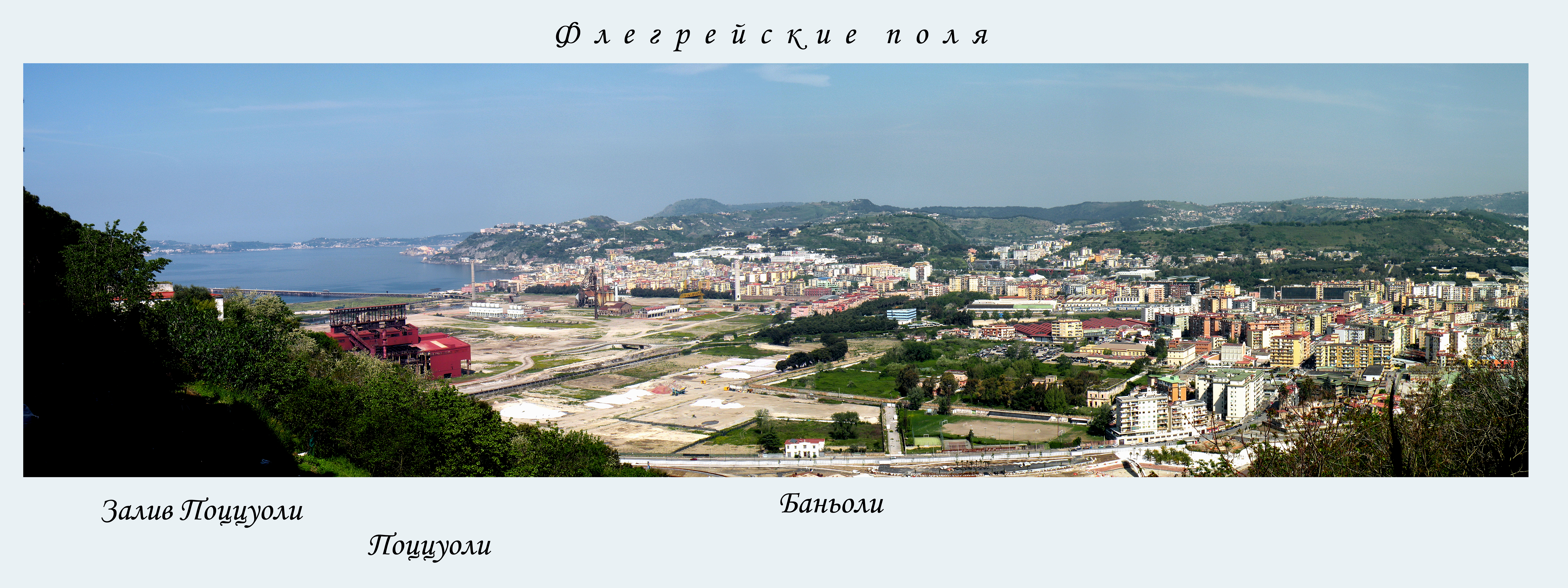 Северо-западный район Неаполя-Флегрейские поля